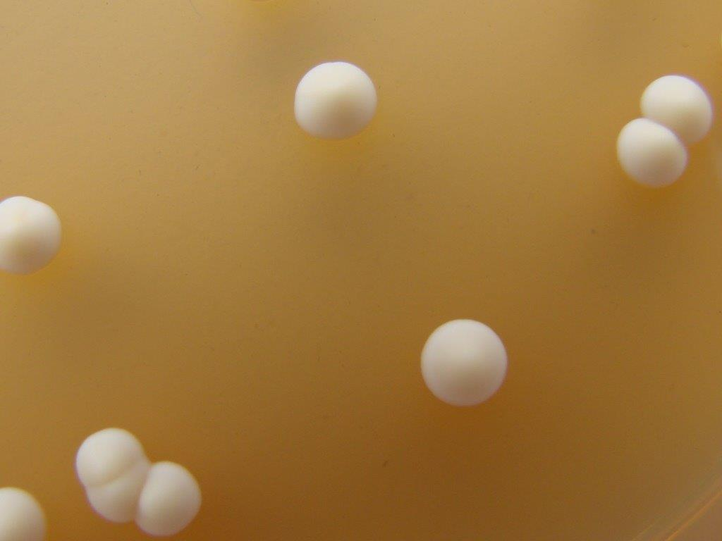 Kvasinky pivní